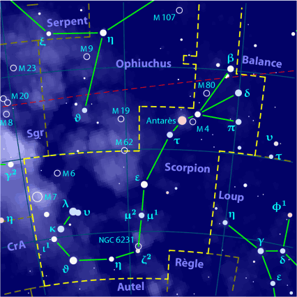 Carte pour la constellation Scorpion Produite à l'aide du logiciel PP3